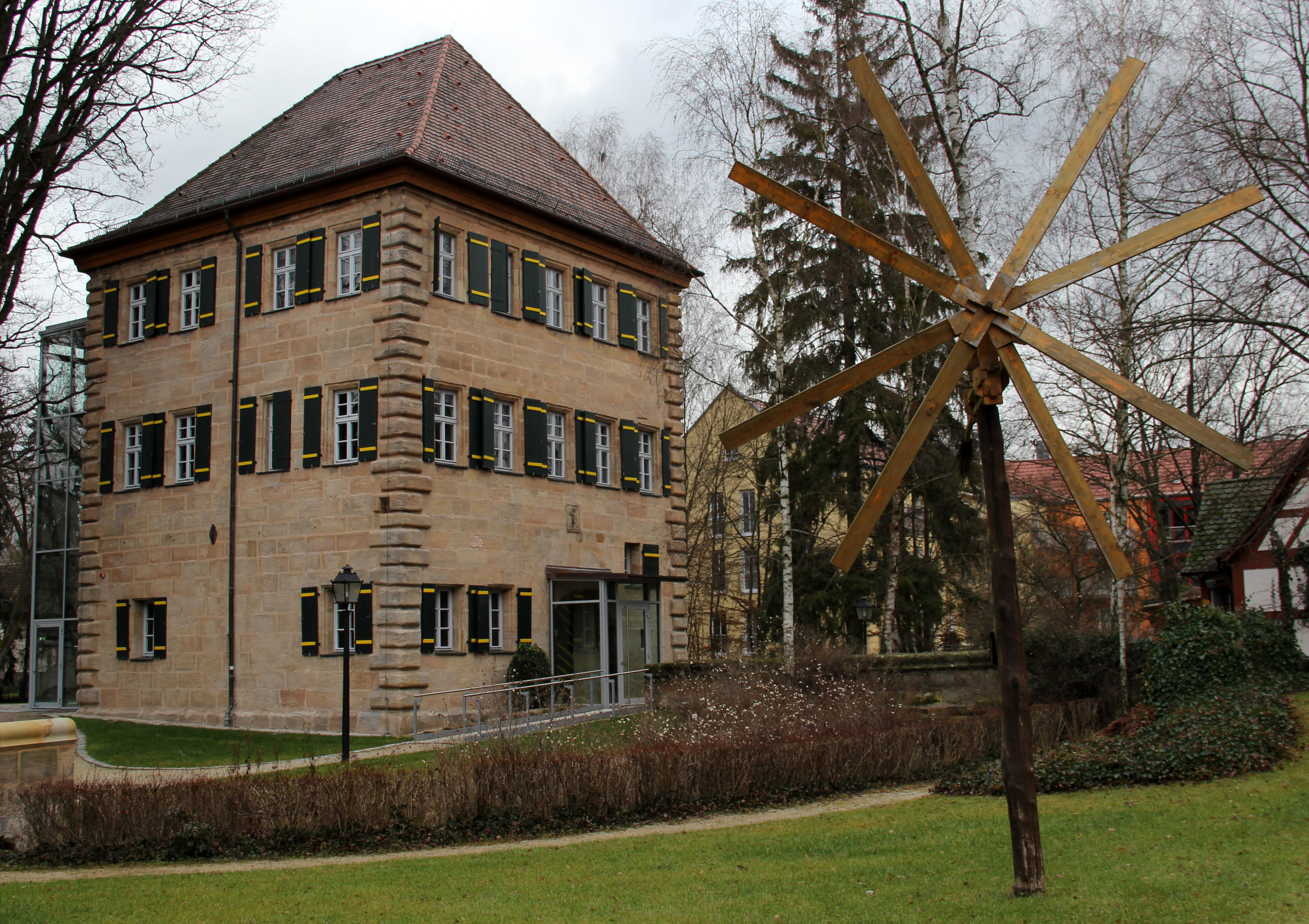 Zeidlerschloss, Blickrichtung Südwest nach Nordost